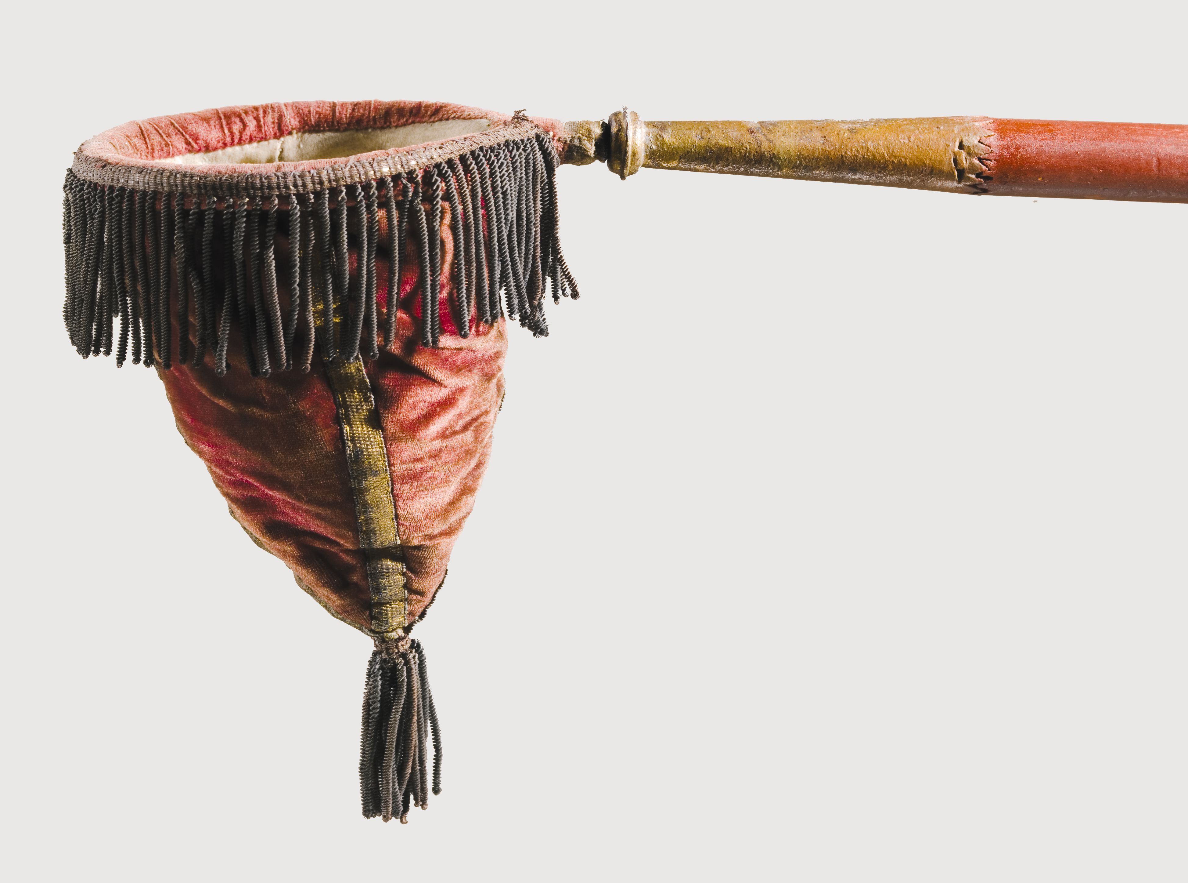 Klingpung, 1715. Skt. Laurentii Kirke, Kerteminde.